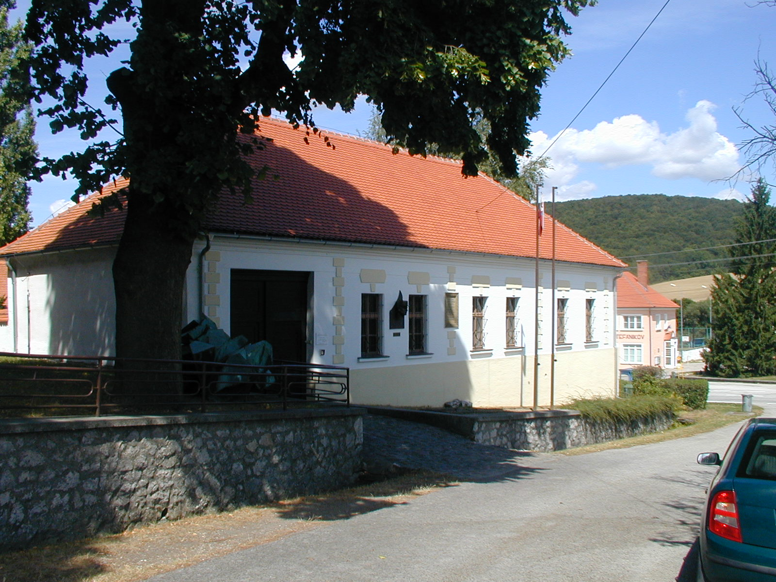 Rodný dům M.R. Štefánika